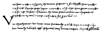 Paolo Dall' Abbaco handwritten Trattato d'Abbaco